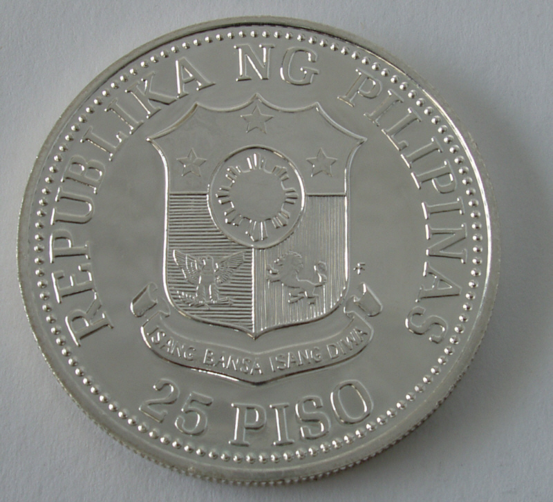 Philippines, 25 Piso, 1981, front, d=38 mm, 500/1000 silver